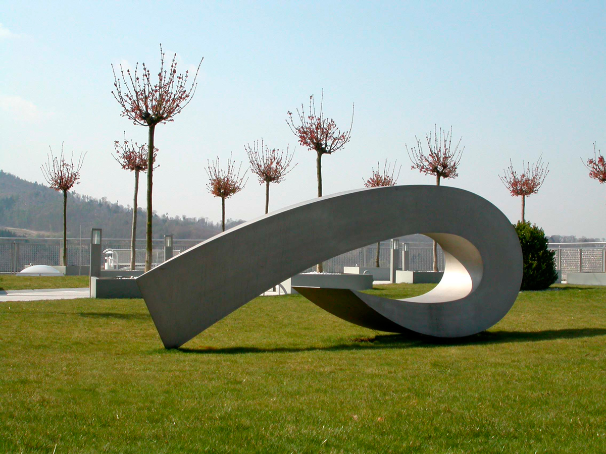 Rüdiger Seidt, TETRAMOON, 1999, Baden-Baden, auf einem Dach der Stadtklinik